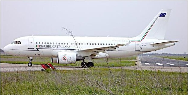 aereo della repubblica